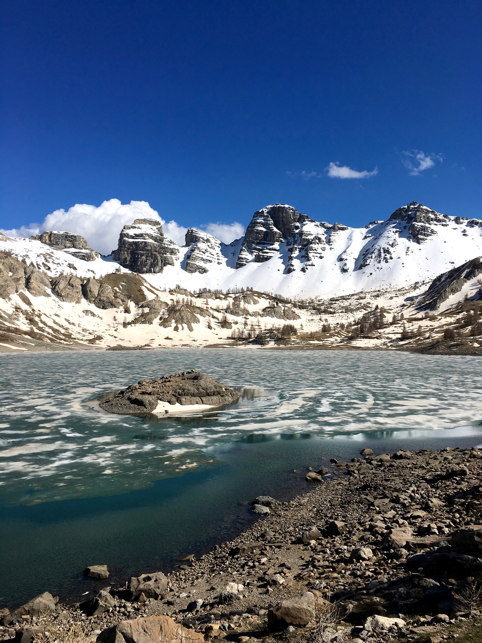 PN Mercantour 1Lac d'Allos dans le parc national du Mercantour, à la fin du printemps, avec les restes de neige et de glace.